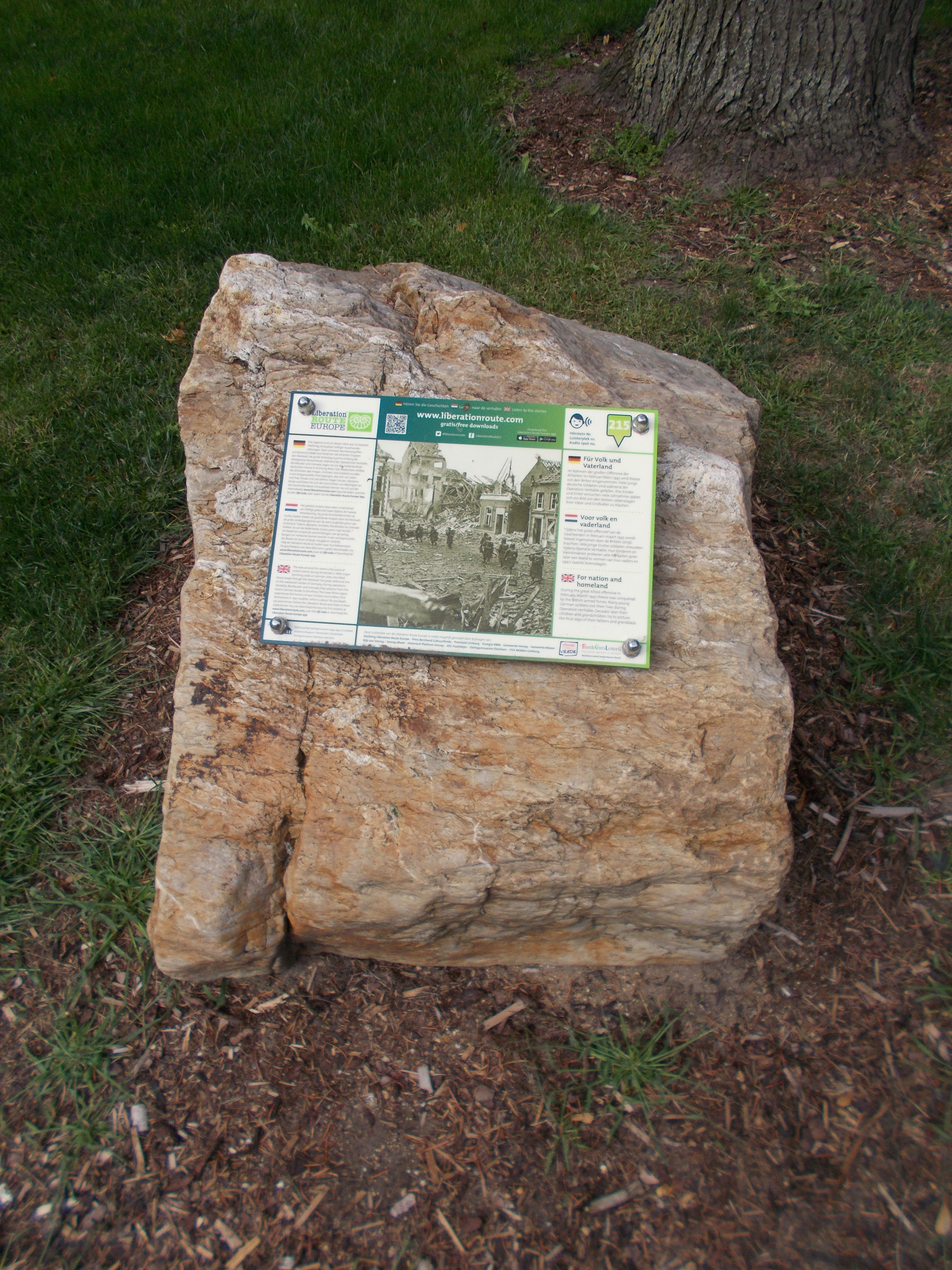 Flüsterstein 215 der Liberation Route Europe auf der Kriegsgräberstätte Weeze.